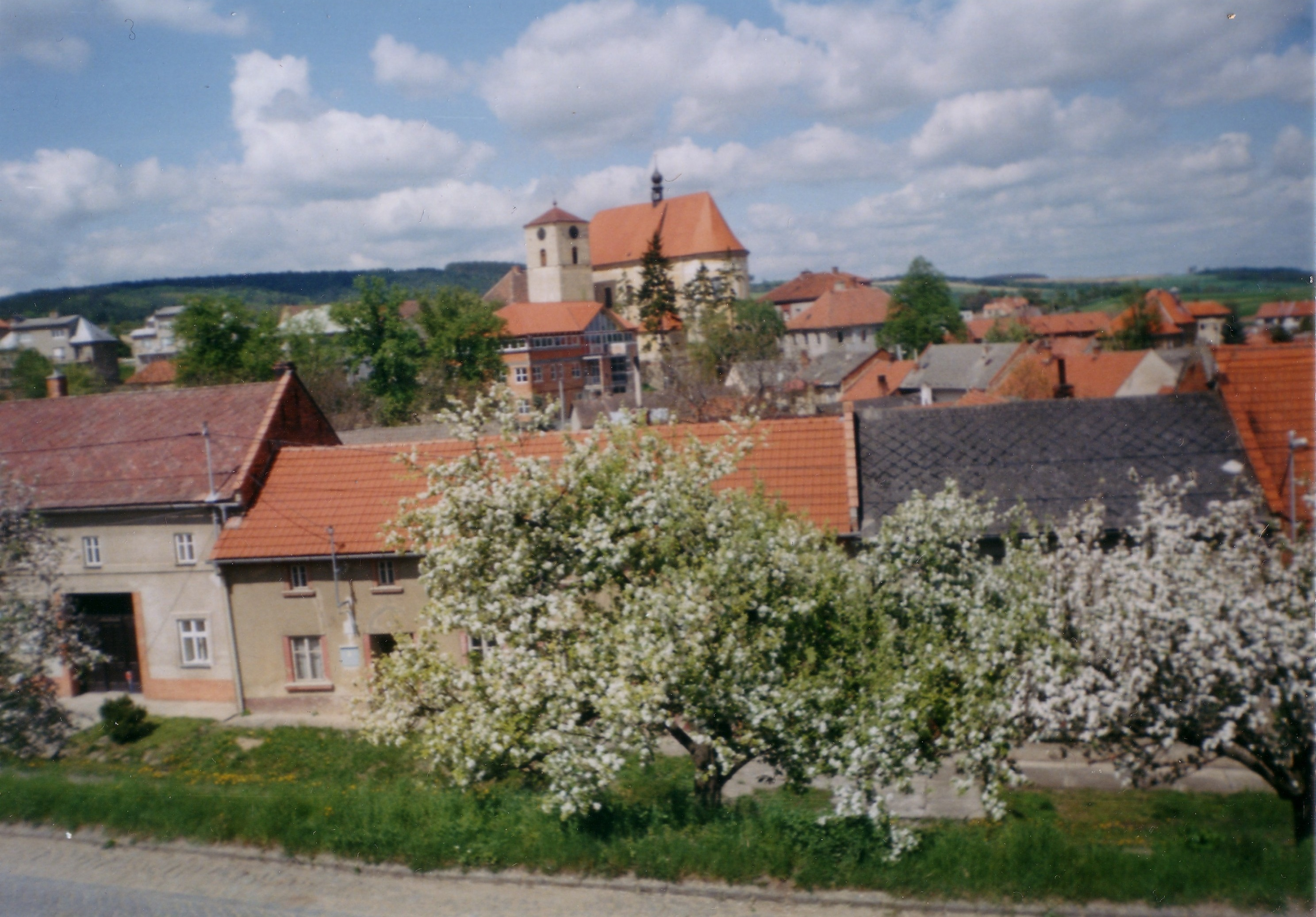 fotografie Určického kostela sv. Jana Křtitele